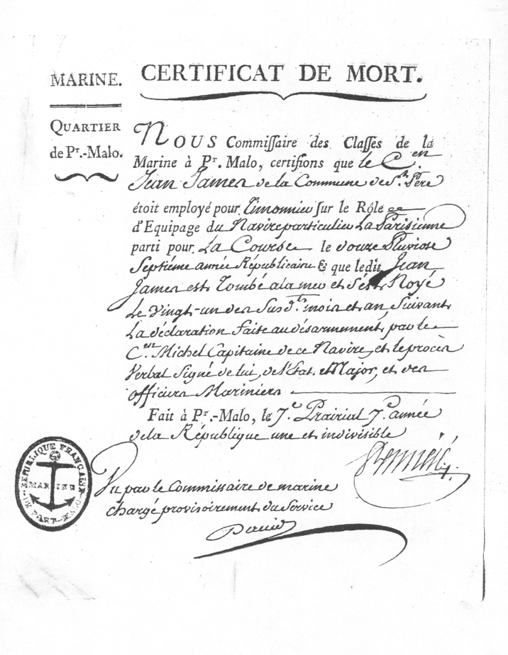 Attestation de la mort en mer d'un matelot corsaire le 21 pluviôse an 7 par le commissaire des classes de la marine à Saint-Malo. (Cote 4 S 42.)